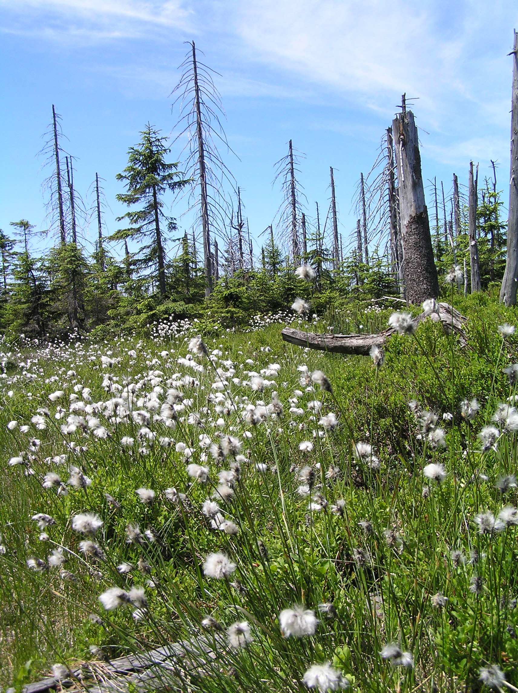 PP Vlčí louka